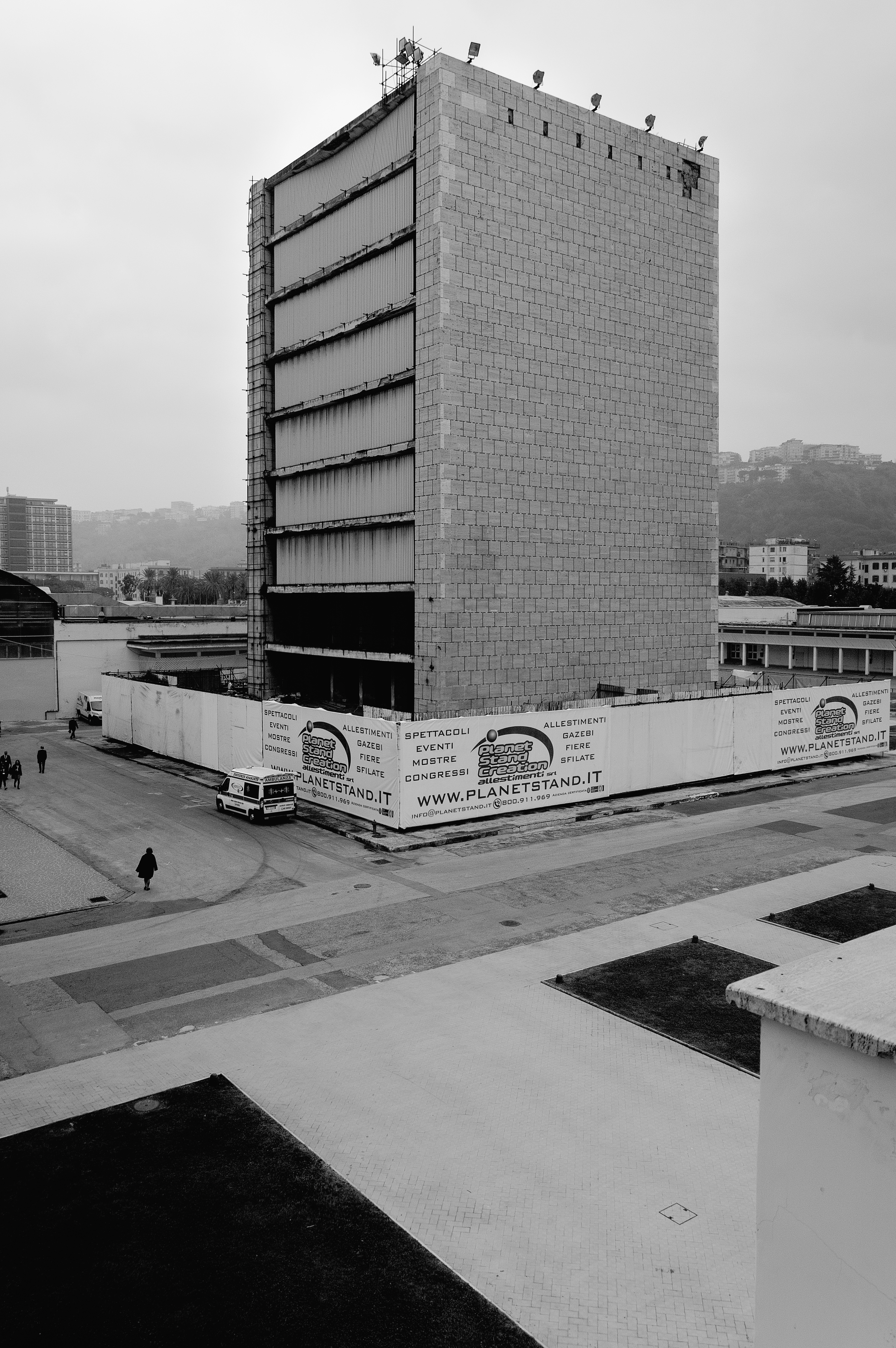 Prospettiva angolare della Torre